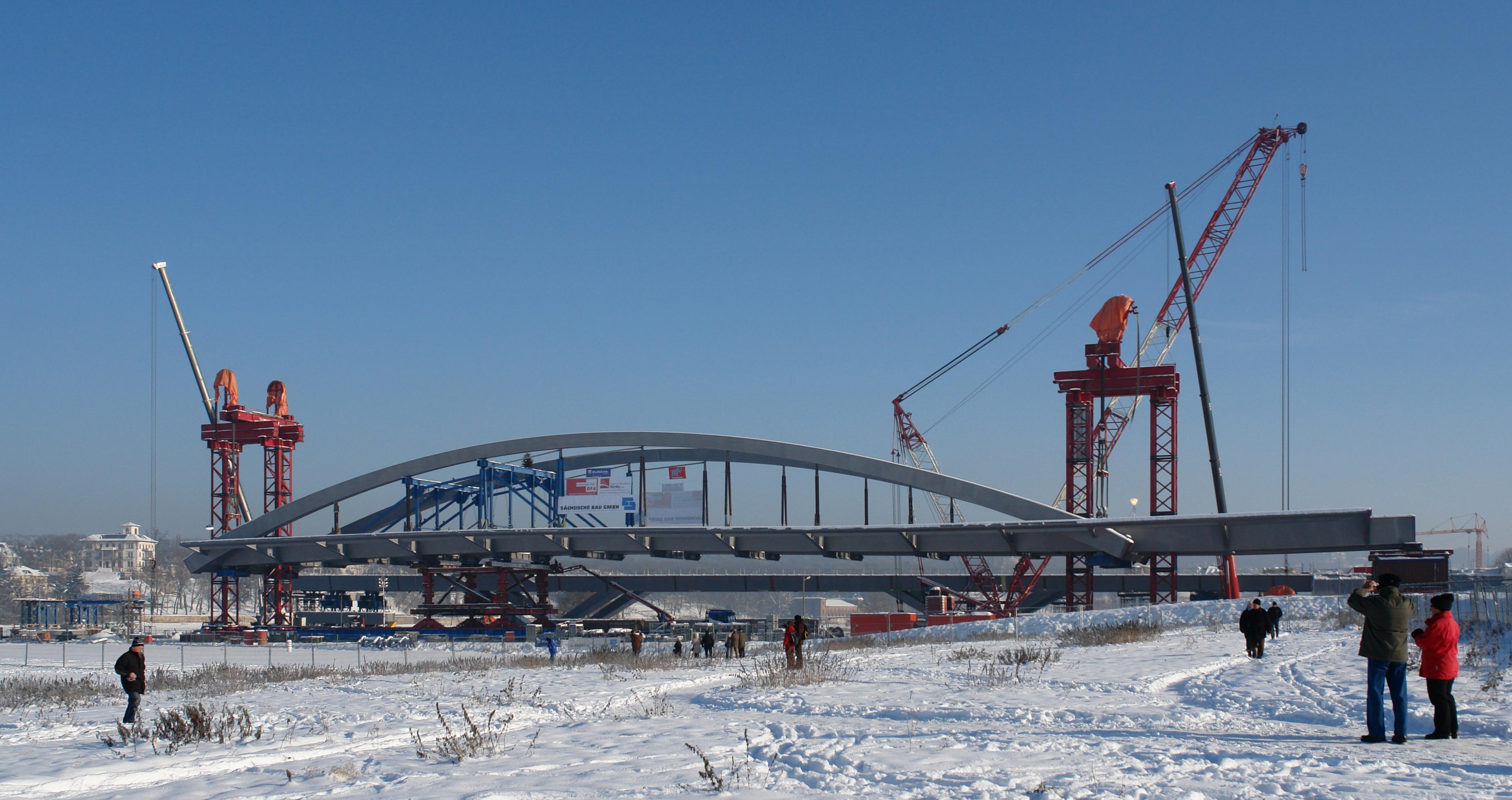 Waldschlößchenbrücke